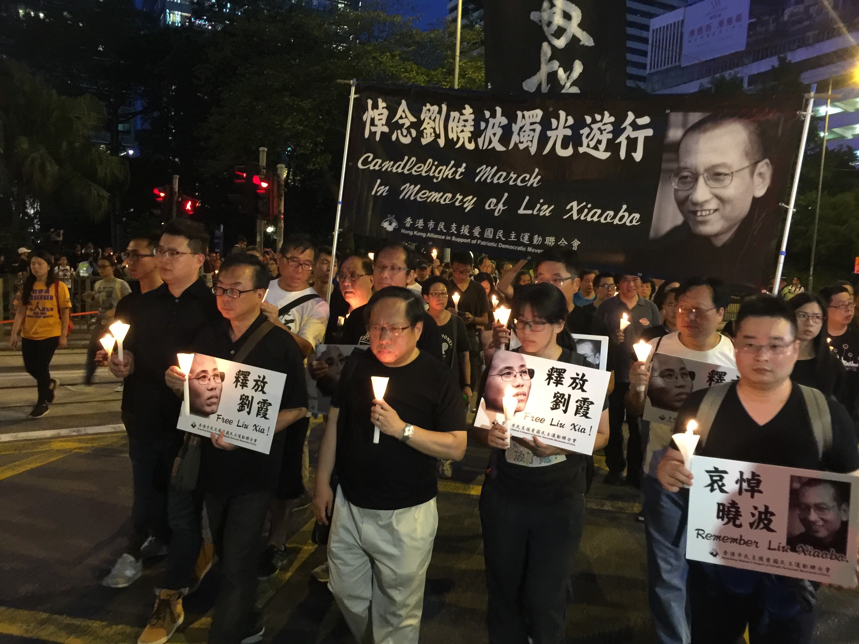 中文（台灣）: 連日來在北京駐港機構中聯辦前設祭壇供民眾獻花及弔唁中國諾貝爾和平獎得主劉曉波的支聯會，7月15日晚發起燭光遊行悼念週四病逝的劉曉波，並強烈要求中國當局讓劉曉波的妻子劉霞真正自由。 港人燭光遊行至中聯辦悼念劉曉波（美國之音海彥拍攝）